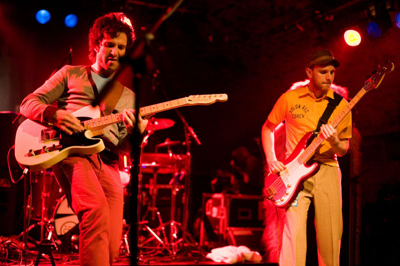 Hoosiers at Club NME, Glasgow